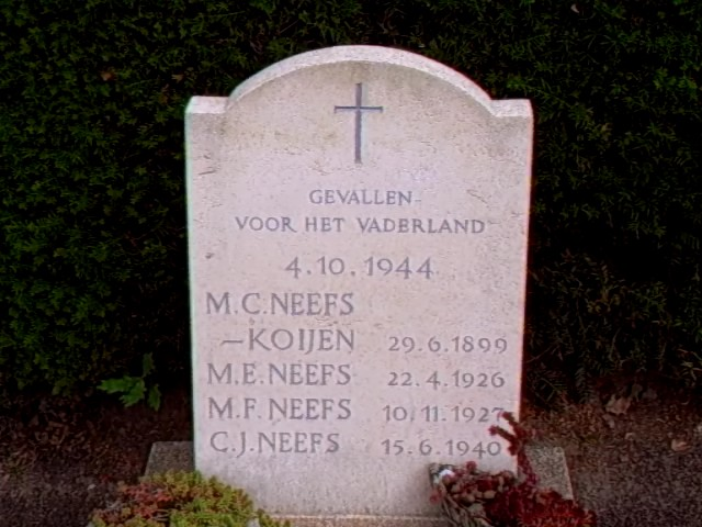 Grafzerk ter nagedachtenis aan mevr. M.C.Neefs-Koijen en kinderen. Slachtoffers van de overval op de Radiopost in de Vloeiweide in Rijsbergen op 4 oktober 1944. Begraven op de RK Begraafplaats in Rijsbergen